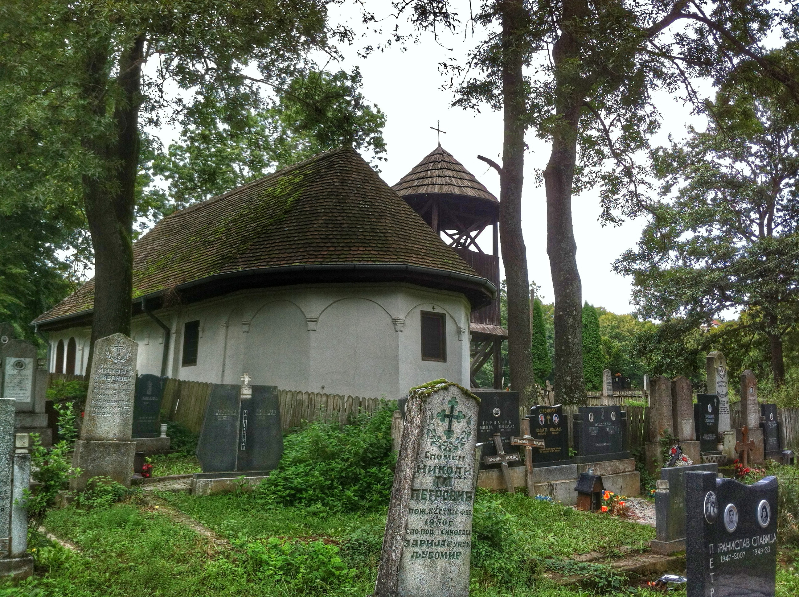 Српски (ћирилица): Црква се налази иза некадашње касарне у шуми. Поред је и поток питке воде са чесмом. Мирно и тихо место за одмор.